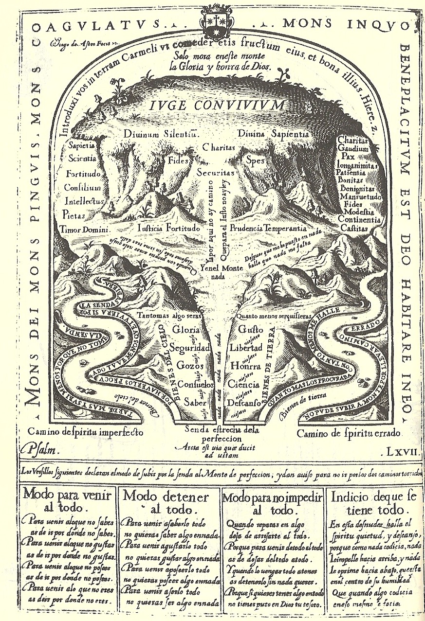 Monte de perfección o Monte Carmelo, obra de San Juan de la Cruz.